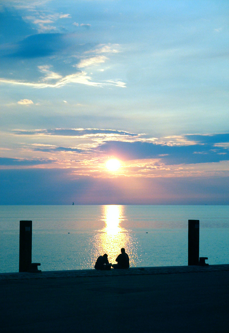 Sonnenuntergang in Schleswig-Holstein